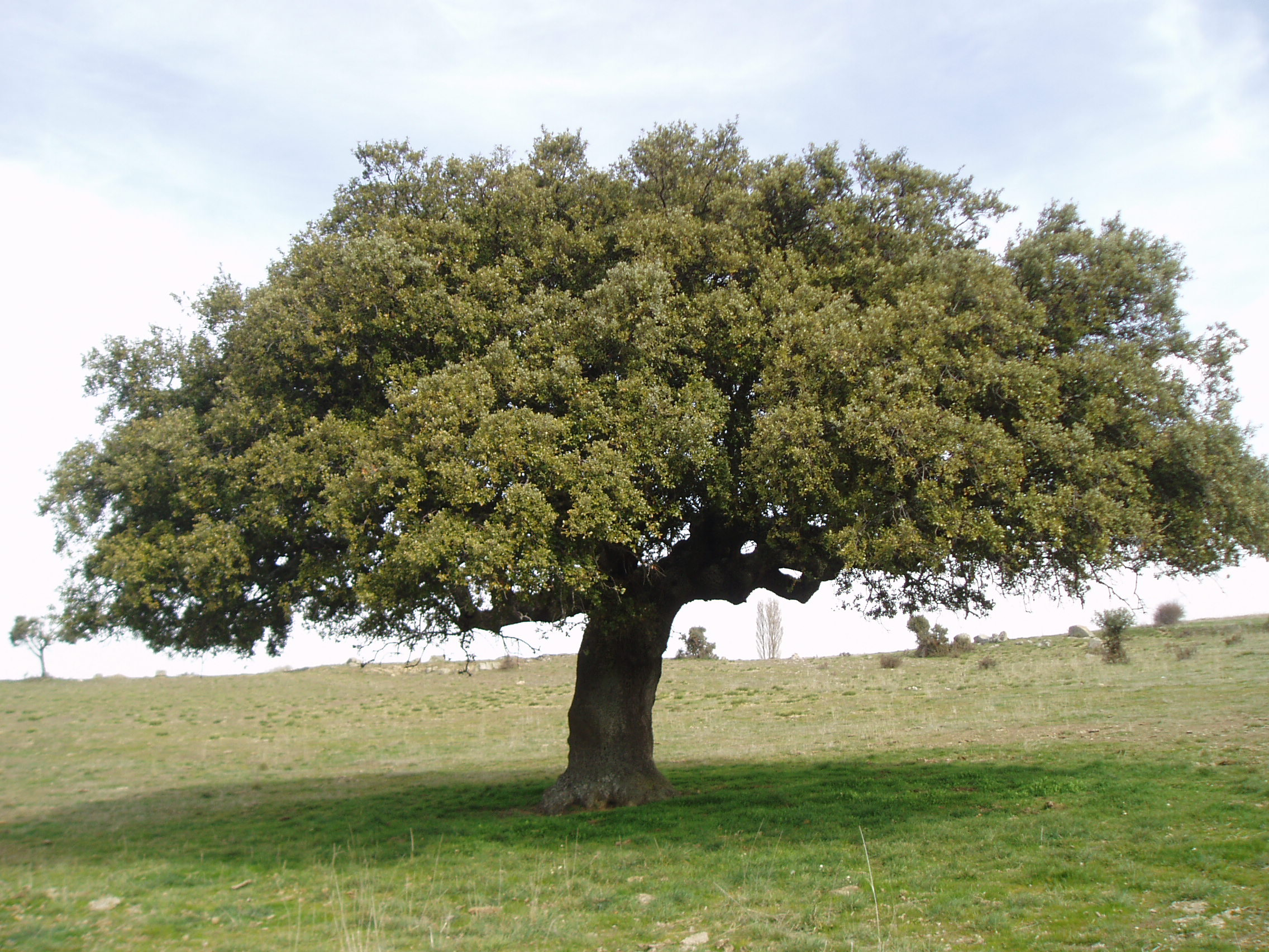 Fotografía de una encina